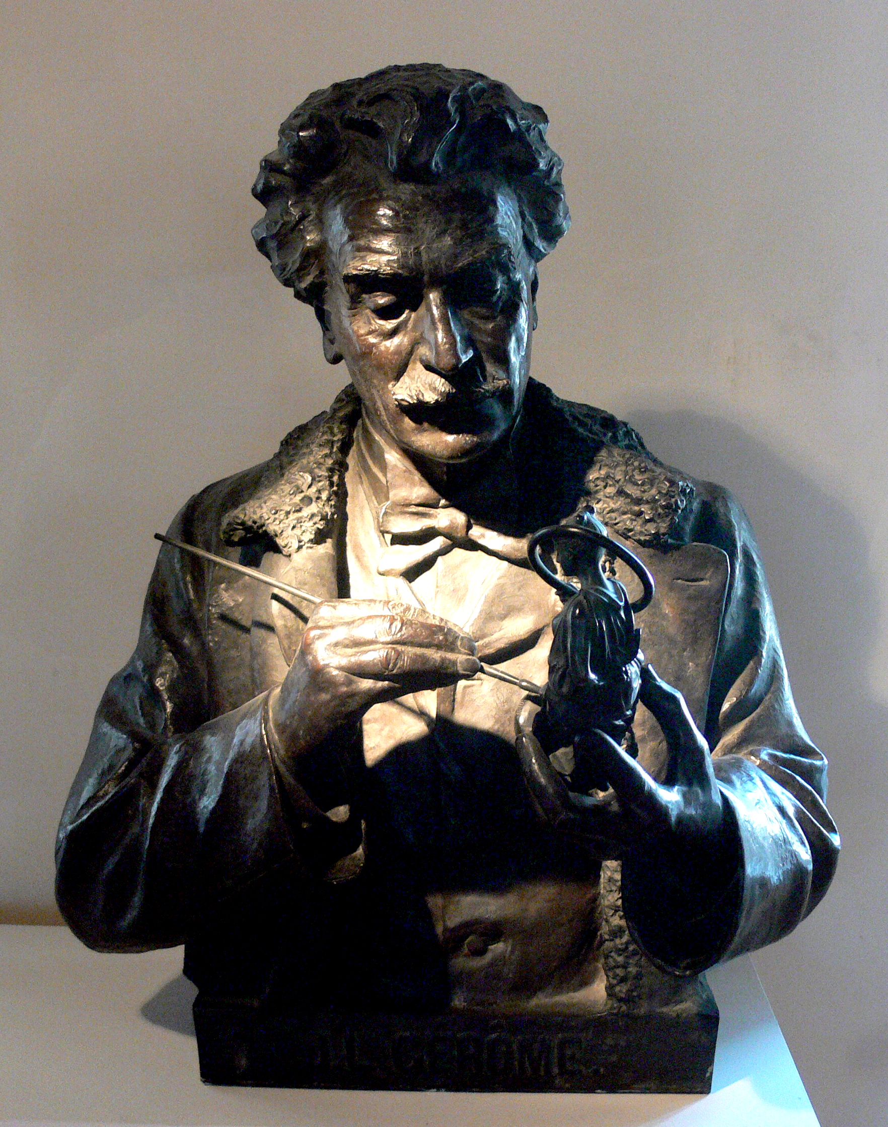 Léopold Bernstamm, Buste de J.-L. Gérôme polychromant Tanagra, 1897, Vesoul, musée Georges-Garret